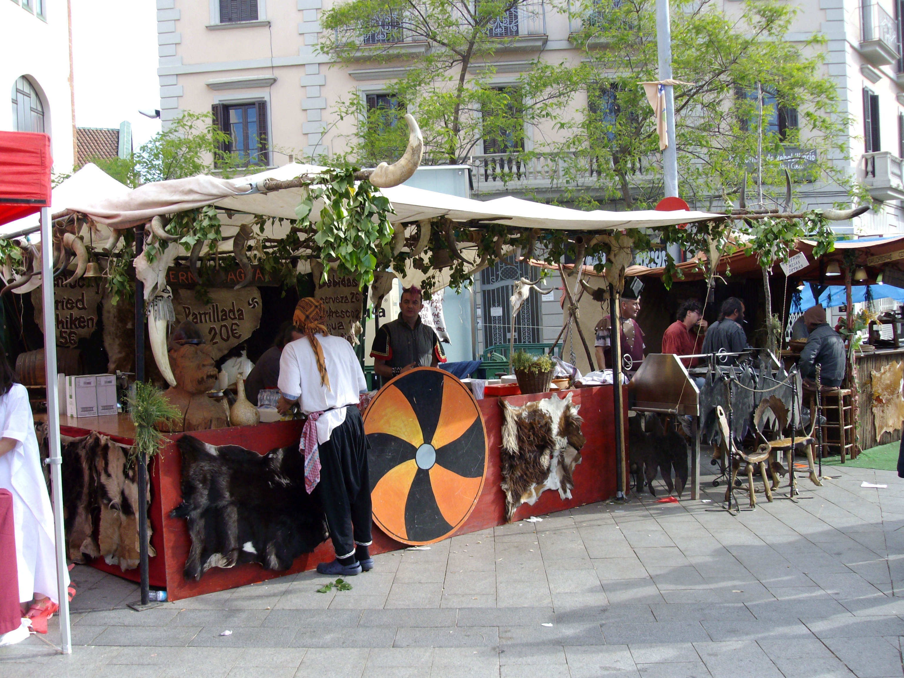 Feria medieval Medievàlia, celebrada los días 17, 18 y 19 de mayo de 2013 alrededor de la plaza del Mercado de Sabadell (Barcelona).